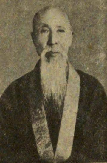 前田慧雲。